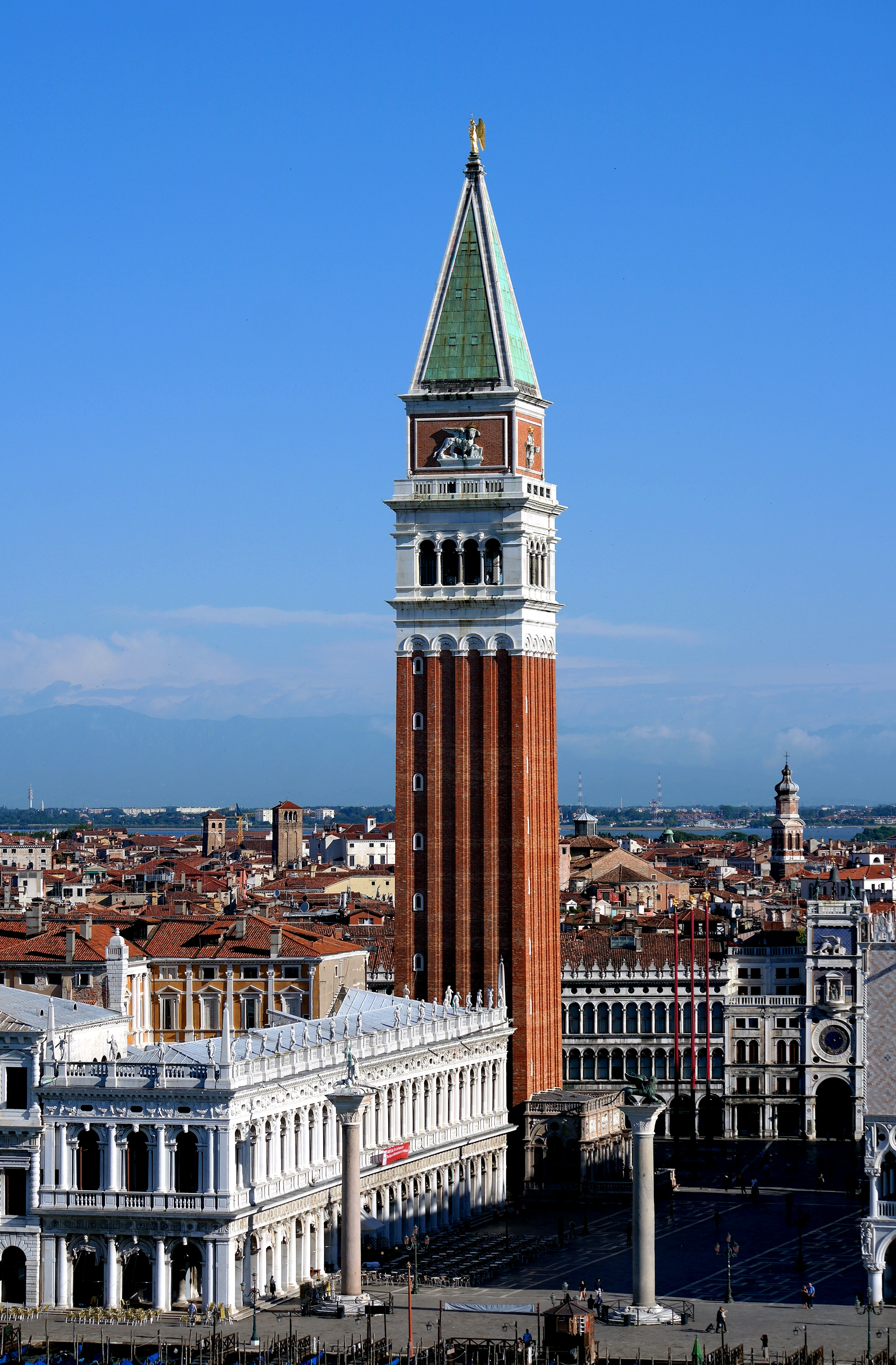 Veduta del campanile di San Marco a Venezia